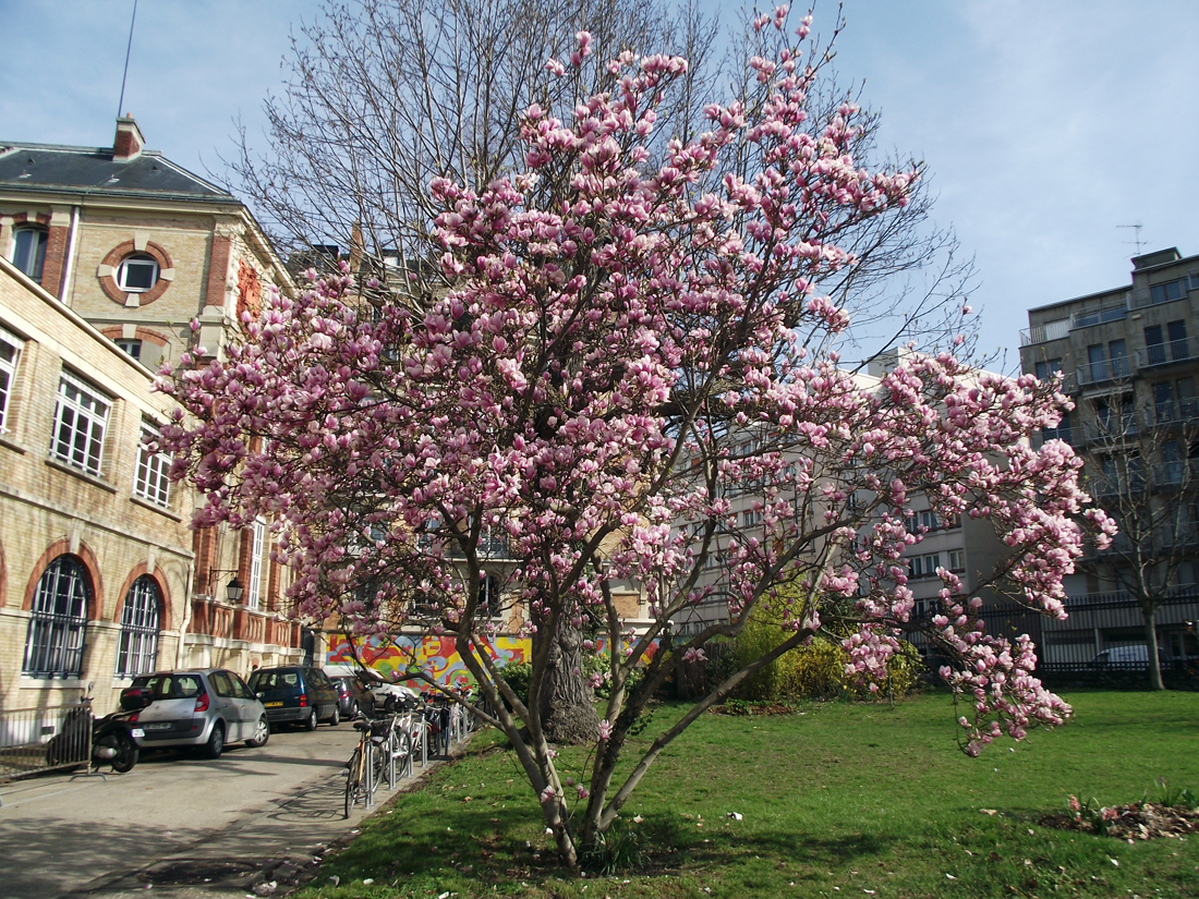 Magnolia × soulangeana